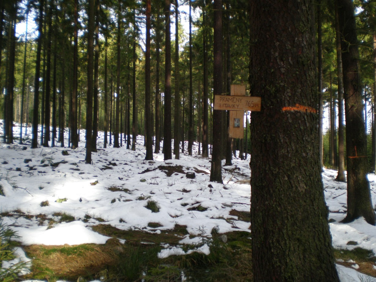 Jeden z pramenů Litavky ve svazích Malého Toku a Hradiště